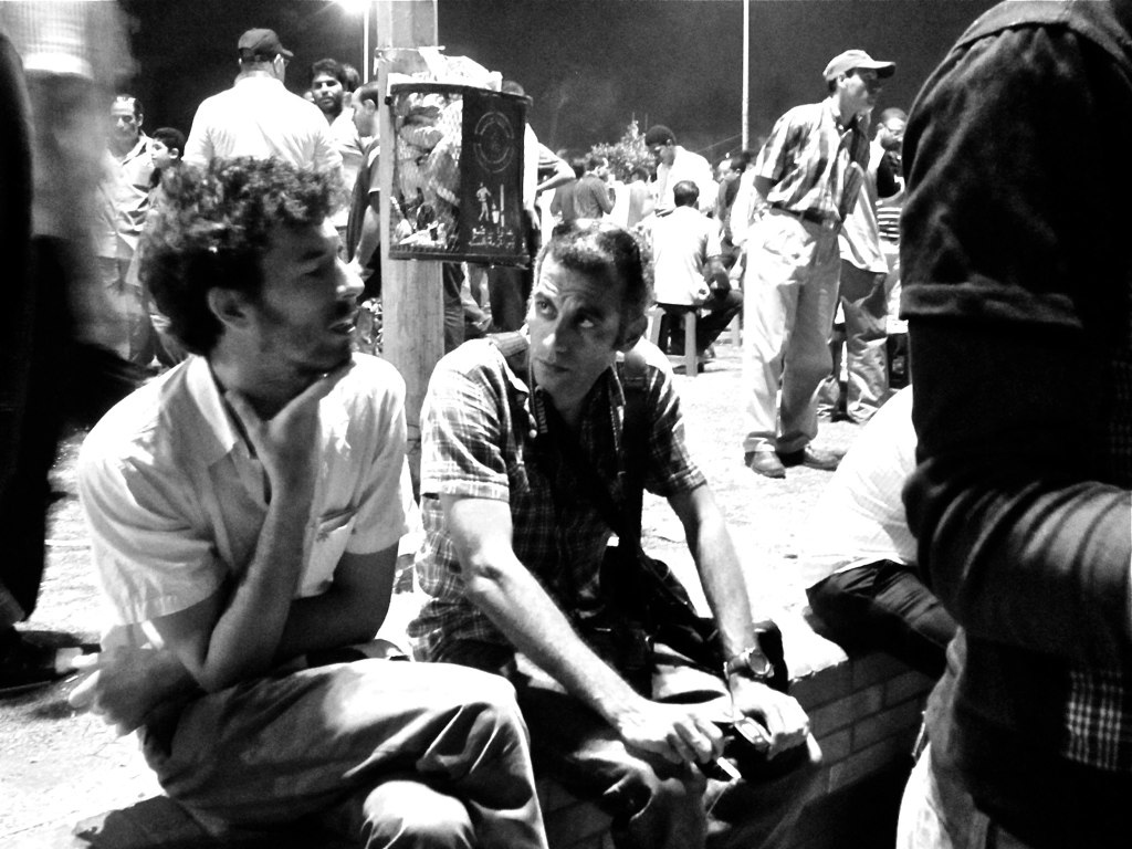 Philip Rizk & Hossam El-Hamalawy